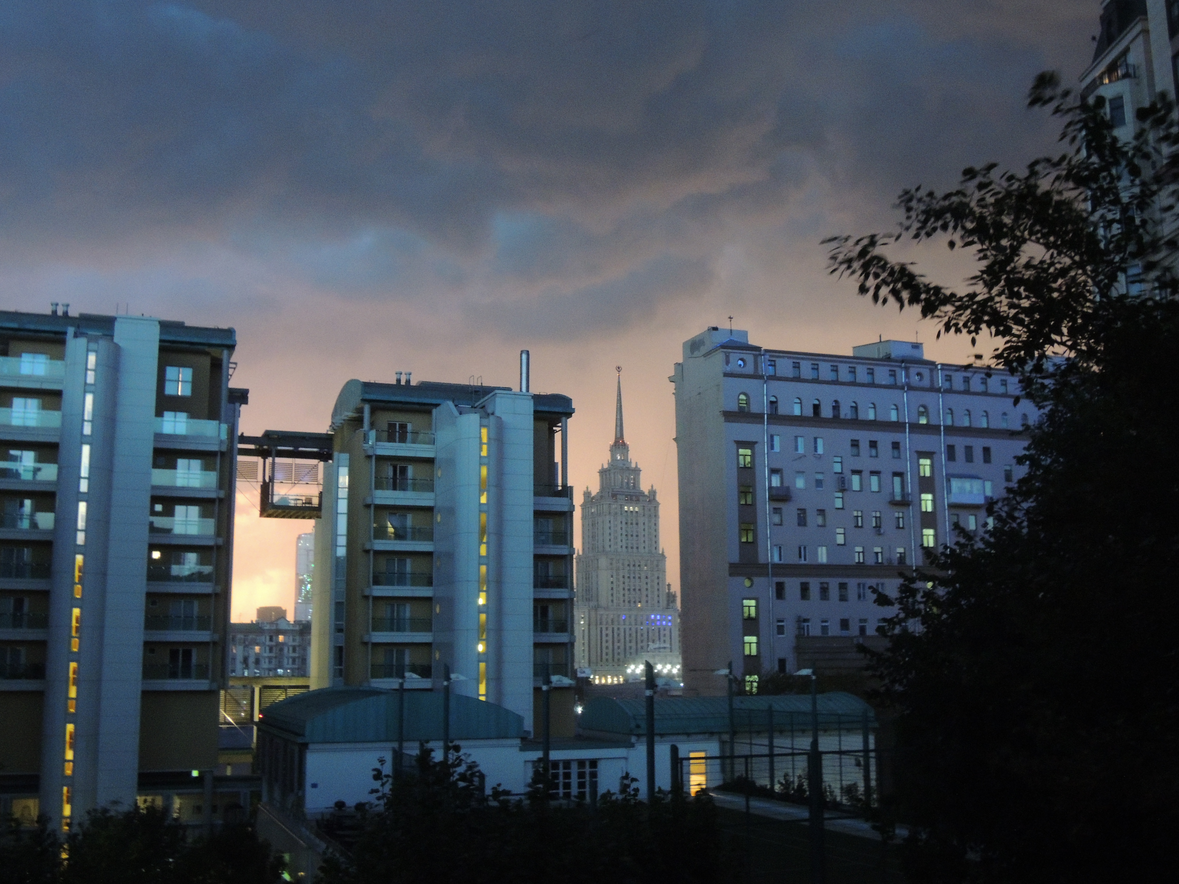 Британское посольство в Москве (внутренний двор)